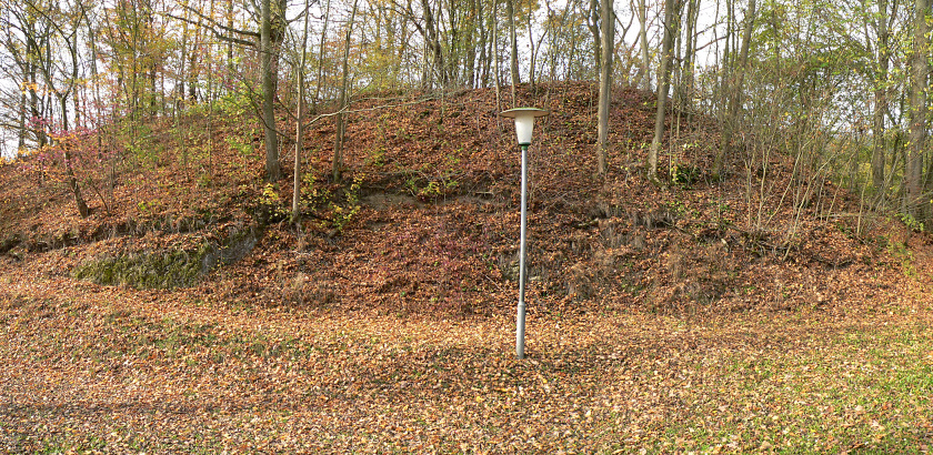 Burghügel Densberg